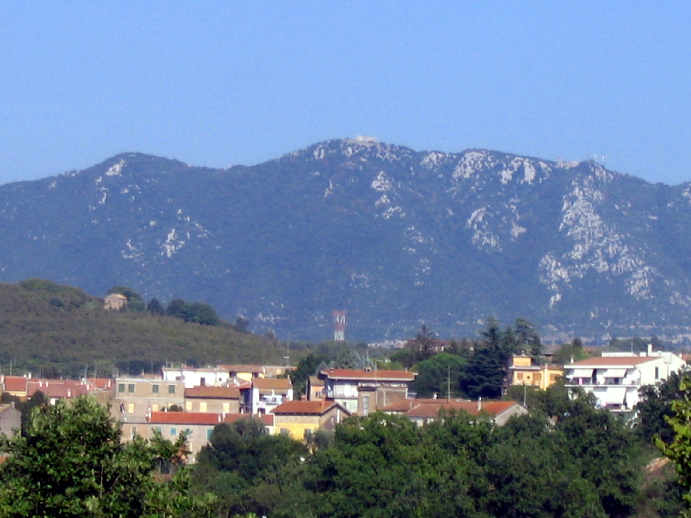 Faleria, Lazio, Italia